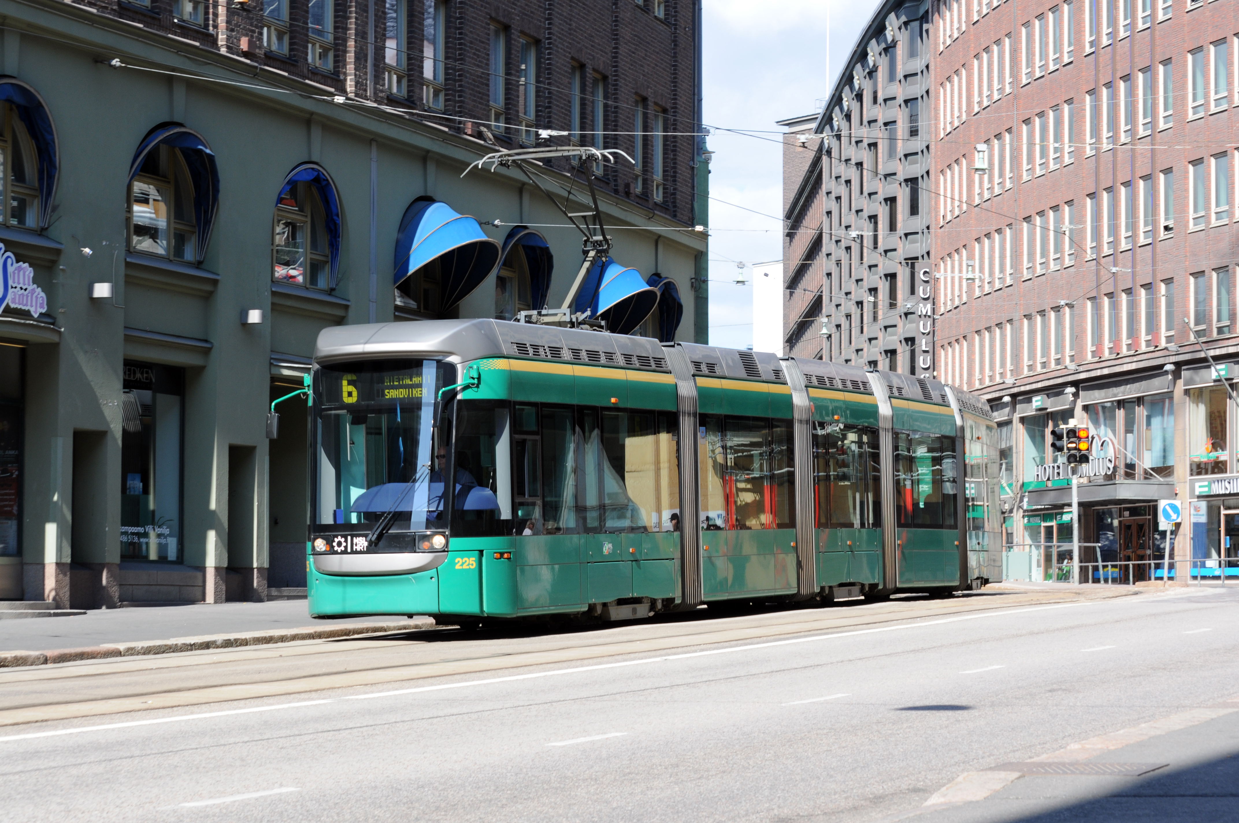 Helsinki